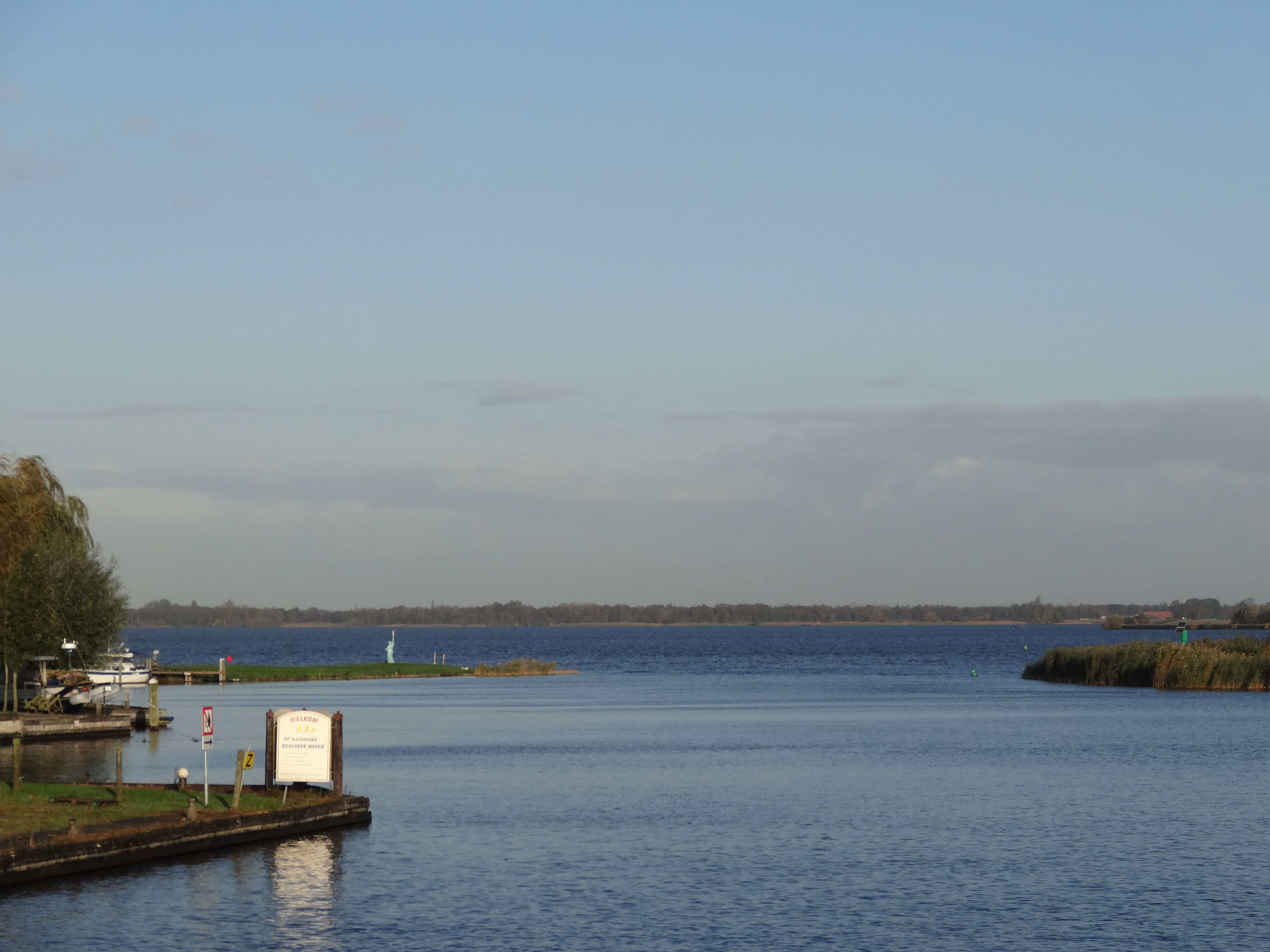 Beulakerwijde gezien vanaf de Blauwe Hand, brug in de Veneweg